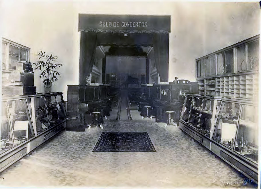 Sala Beethoven em Porto Alegre.